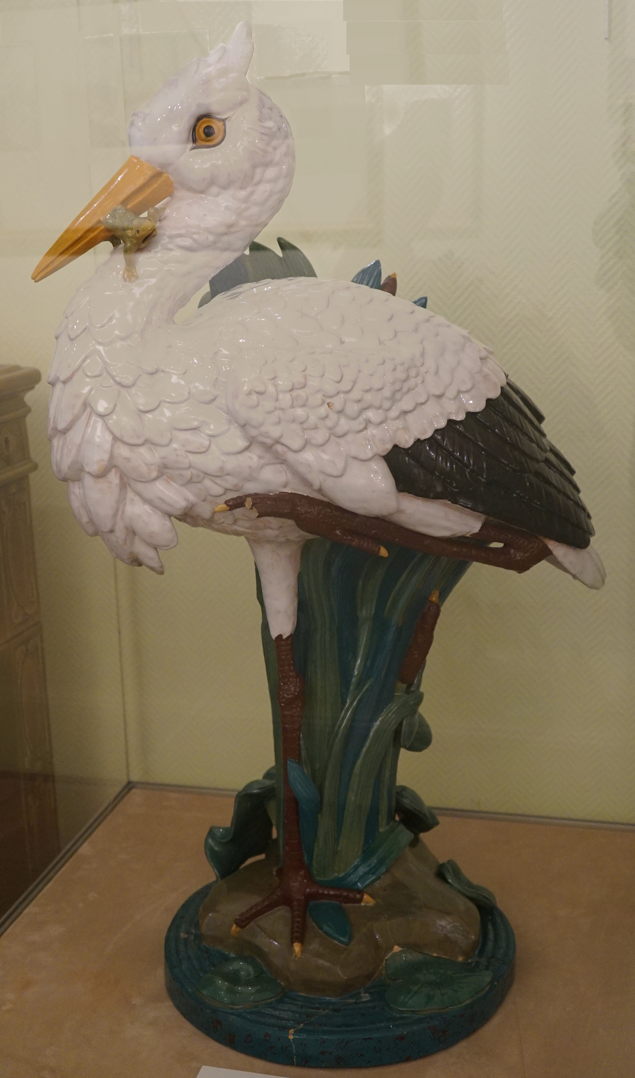 au musée de TOul.